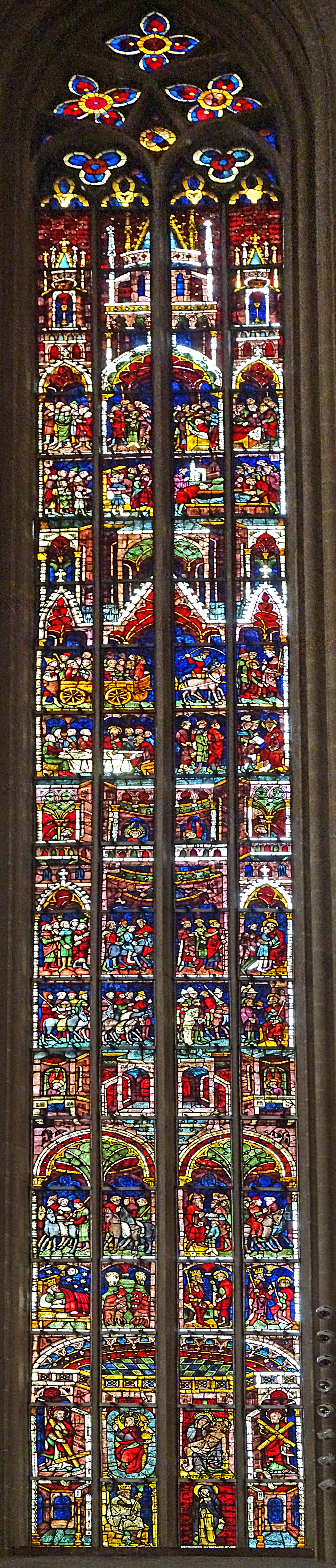 Josephsfenster (sV) im Hohen Chor des Erfurter Doms St. Marien